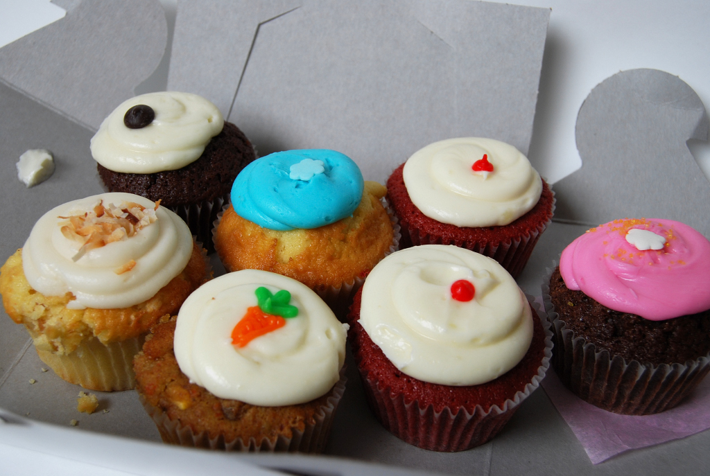 cupcakes!